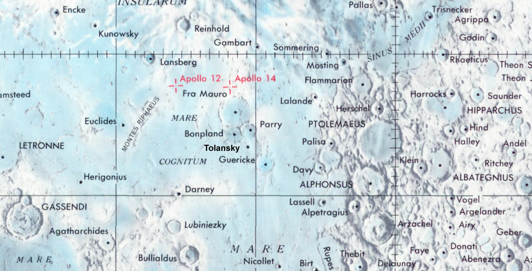 Cráter lunar Tolansky. Localización. (Lunar Chart LPC1. Second Edition)